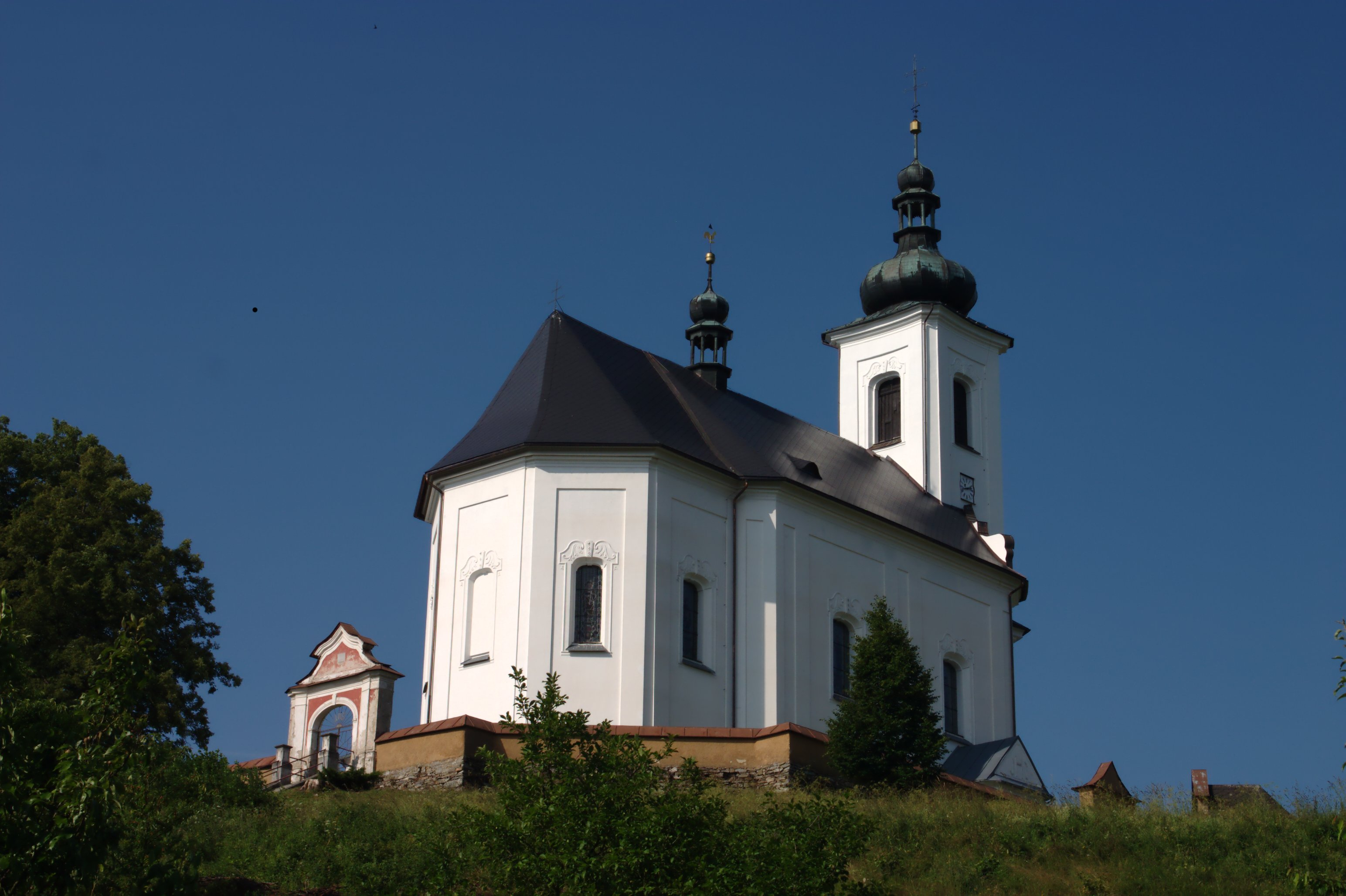 Kostel Nejsvětější Trojice (Kopřivná)